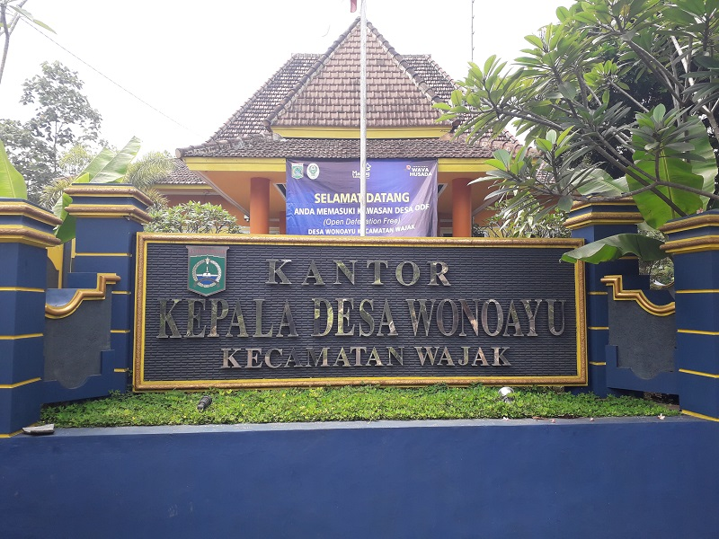 photo depan kantor Kepala Desa Wonoayu